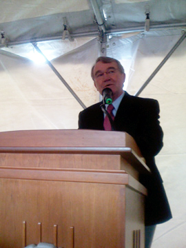 Roger S. Fouts delivering Washoe's Eulogy